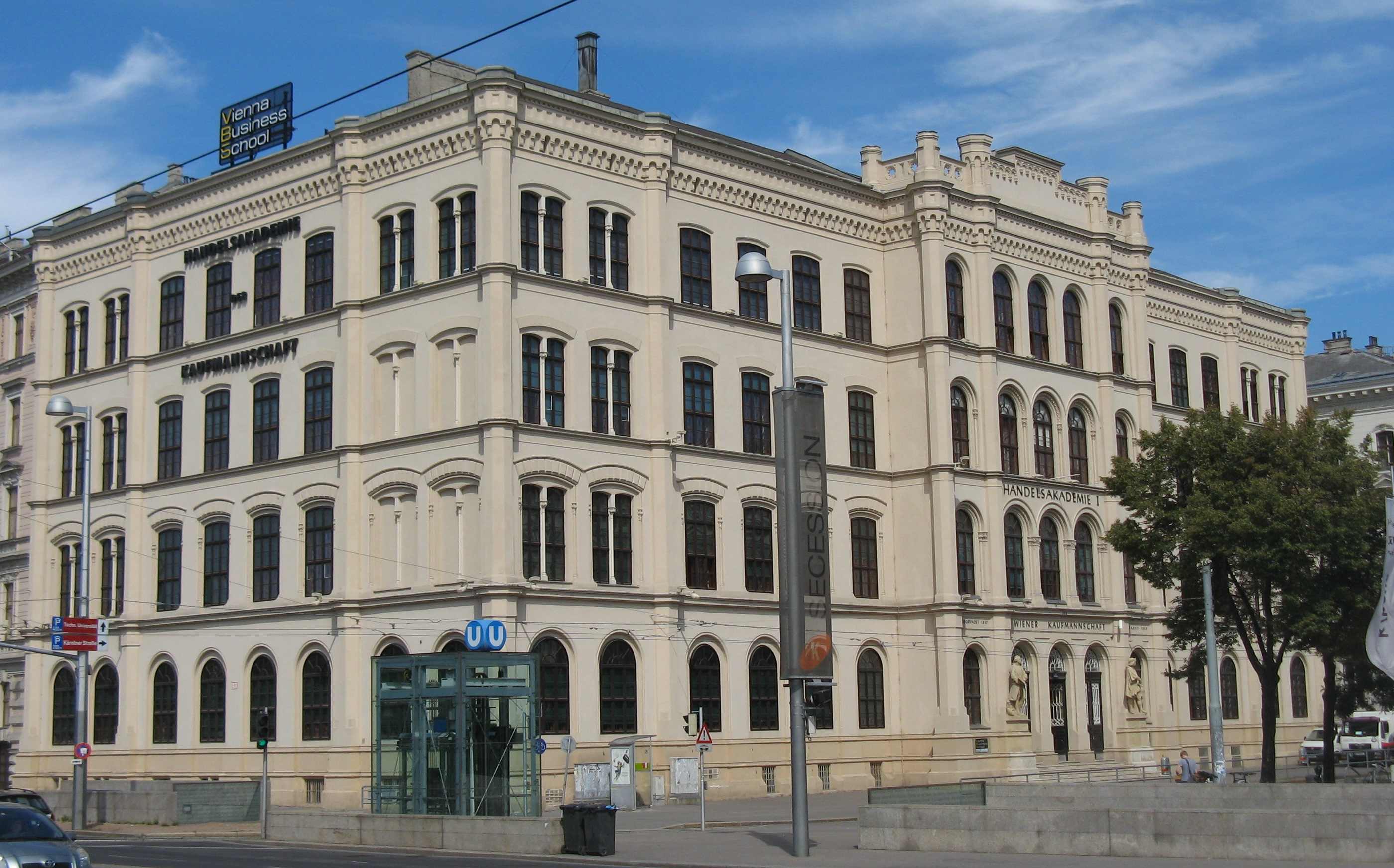 Handelsakademie I (1860-62) von Ferdinand Fellner d. Ä., Akademiestraße 12, Wien-Innere Stadt